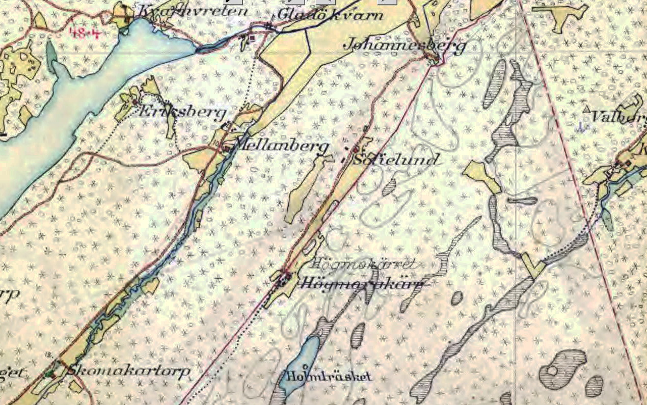 Gladö kvarn och torpen Eriksberg, Mellanberg, Sofielund, Skomakartorp